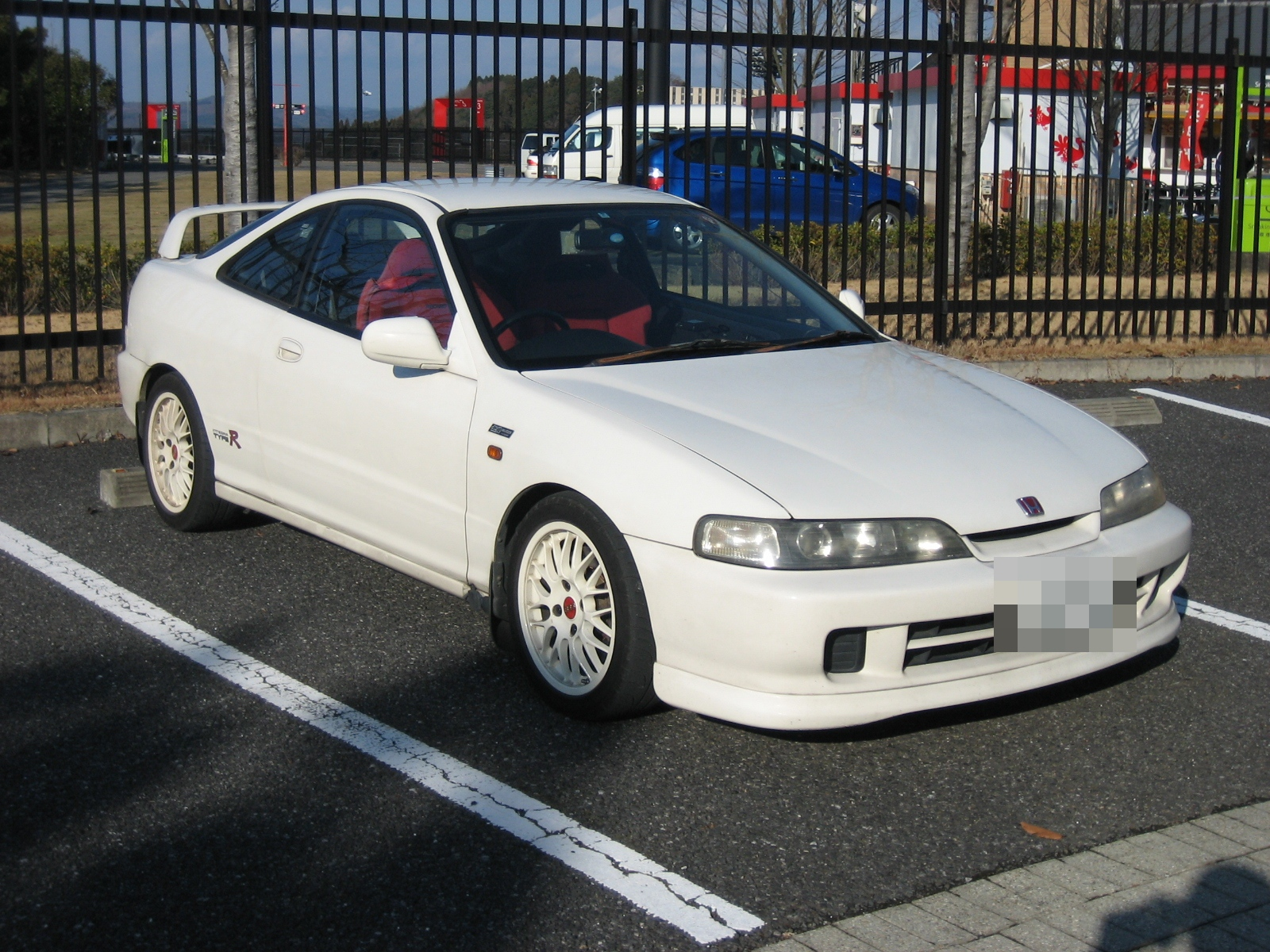 Honda Integra Type R in Motegi, Tochigi.